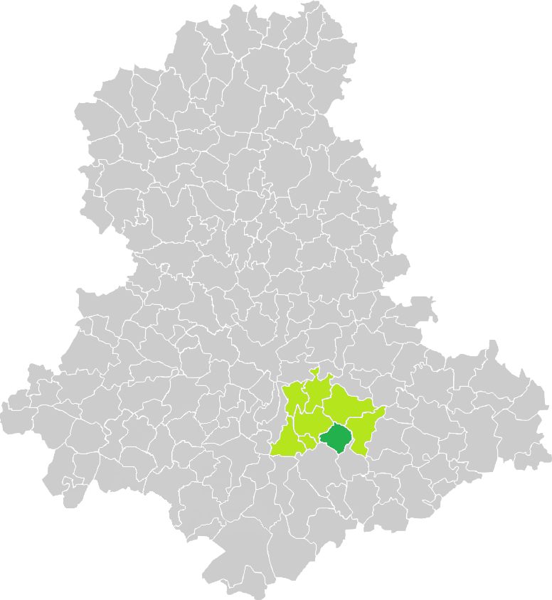 Carte de situation de la commune de Saint-Genest-sur-Roselle (en vert foncé) dans le votre Canton (en vert clair) sur une carte des communes de la Haute-Vienne